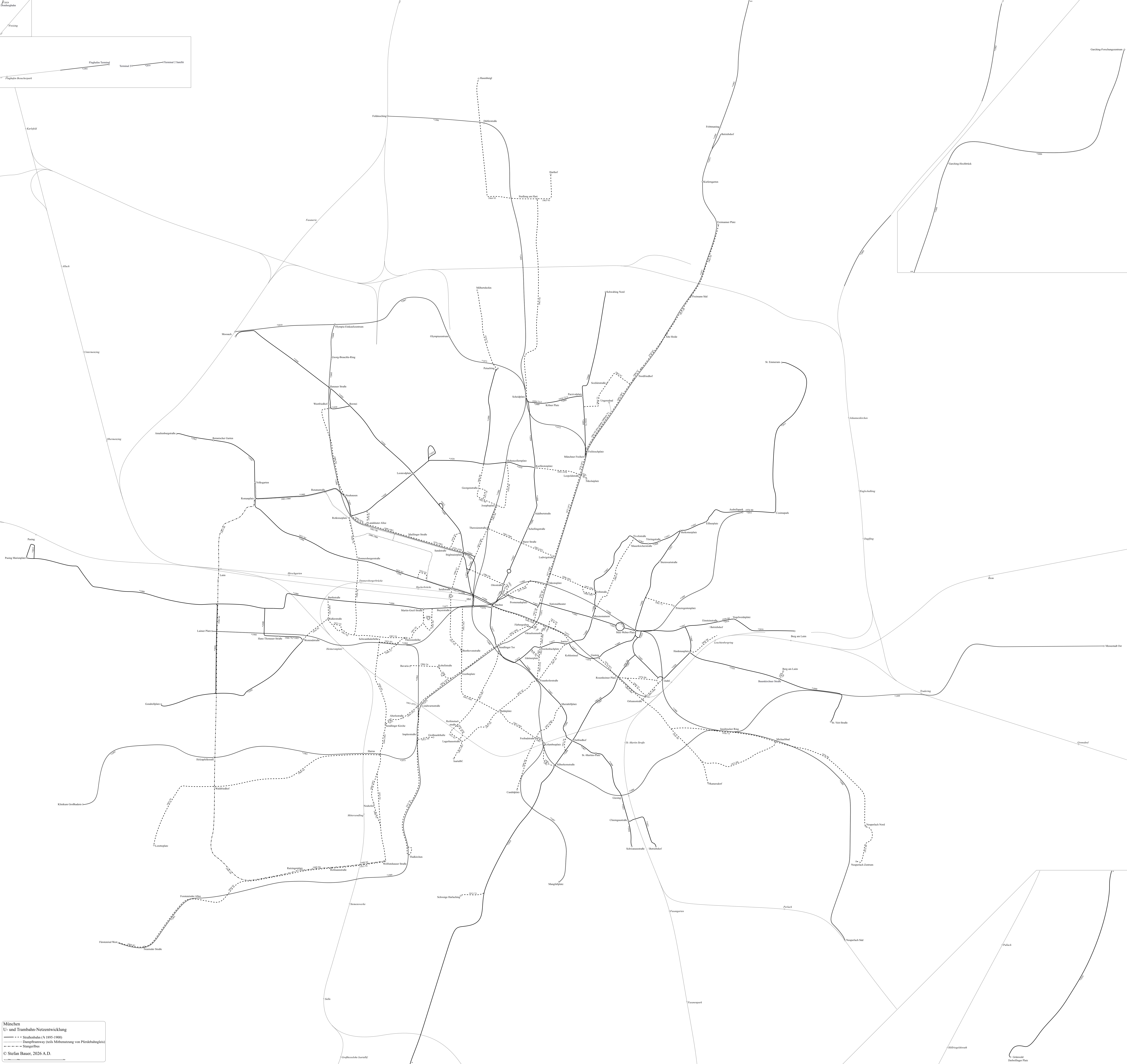 U- und Trambahn-Netzentwicklung München (mit Dampftrambahn und O-Bus)